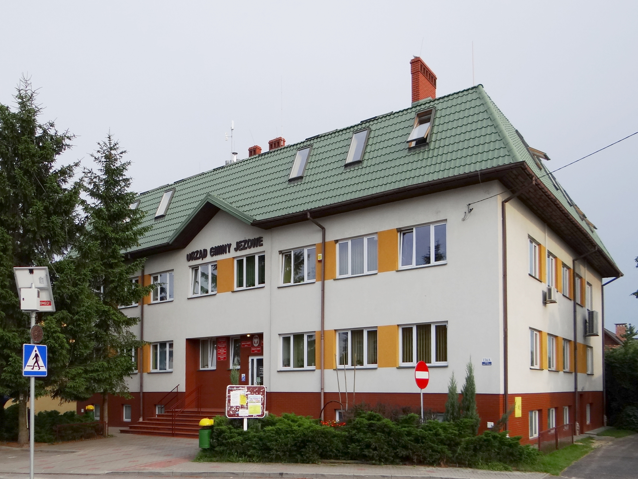 Zdjęcie wykonane w miejscowości Jeżowe, powiat niżański.